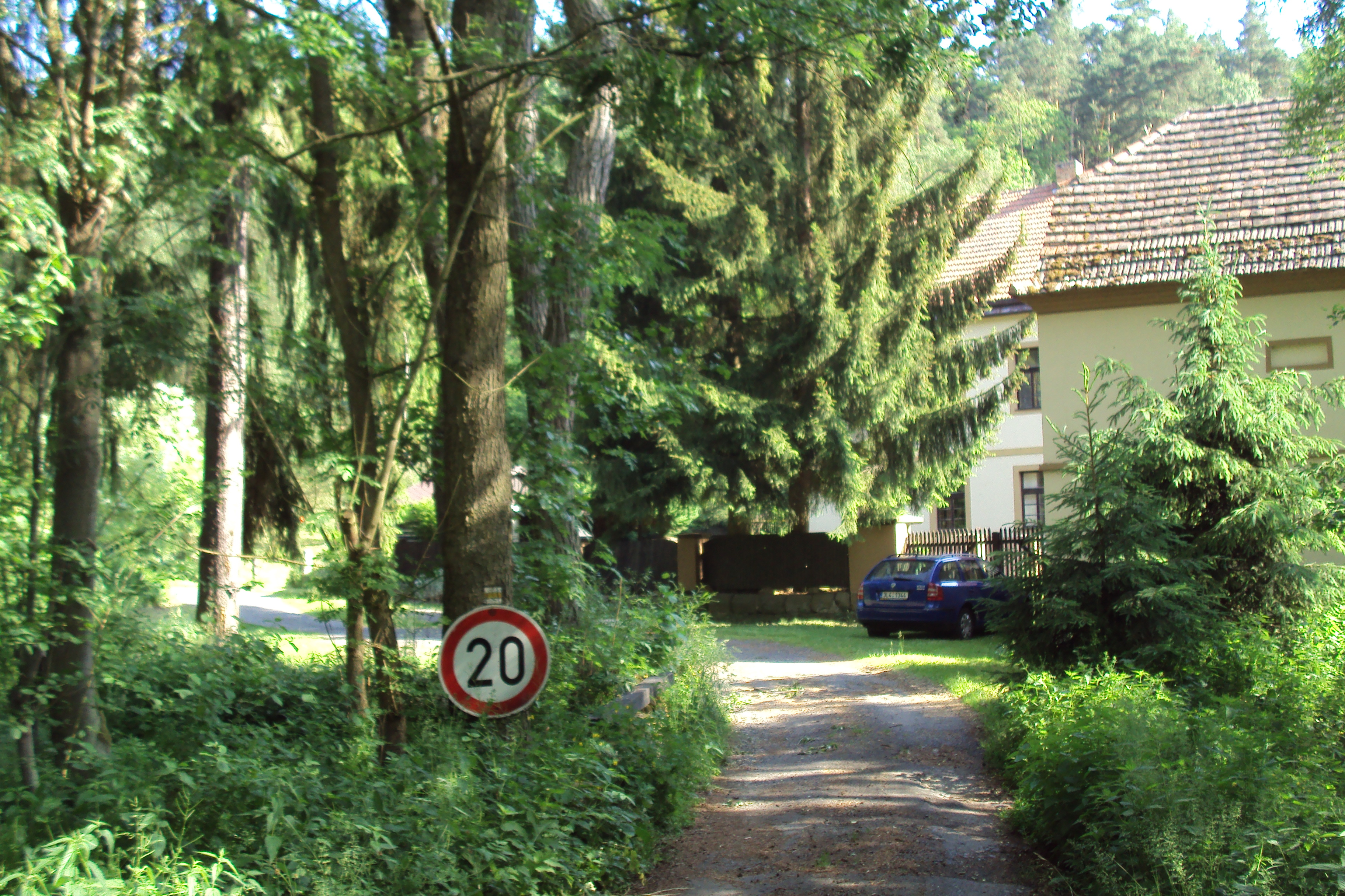 Osada Vrabcov na katastru obce Deštná